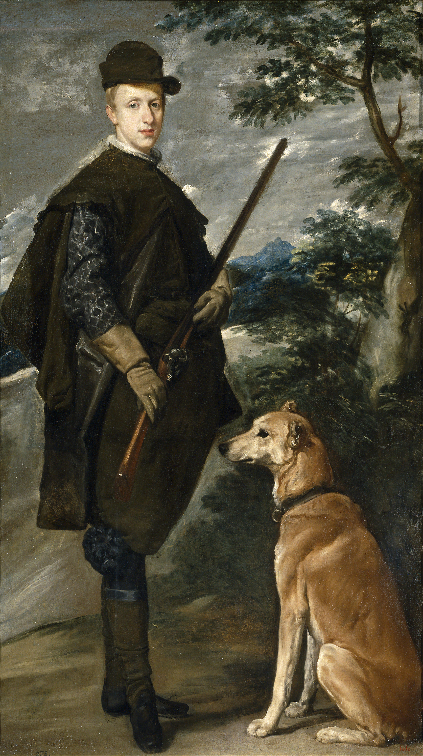 Retrato del cardenal-infante Fernando de Austria (1609-1641), que fue hijo del rey Felipe III de España y de la reina Margarita de Austria.